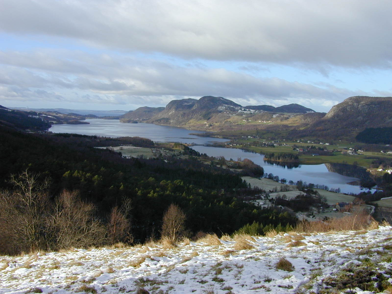 Bildet er tatt fra gården Rotabakken med utsikt mot vest. Inderst er Østerhusvatnet og ytterst Bjøreimsvatnet.